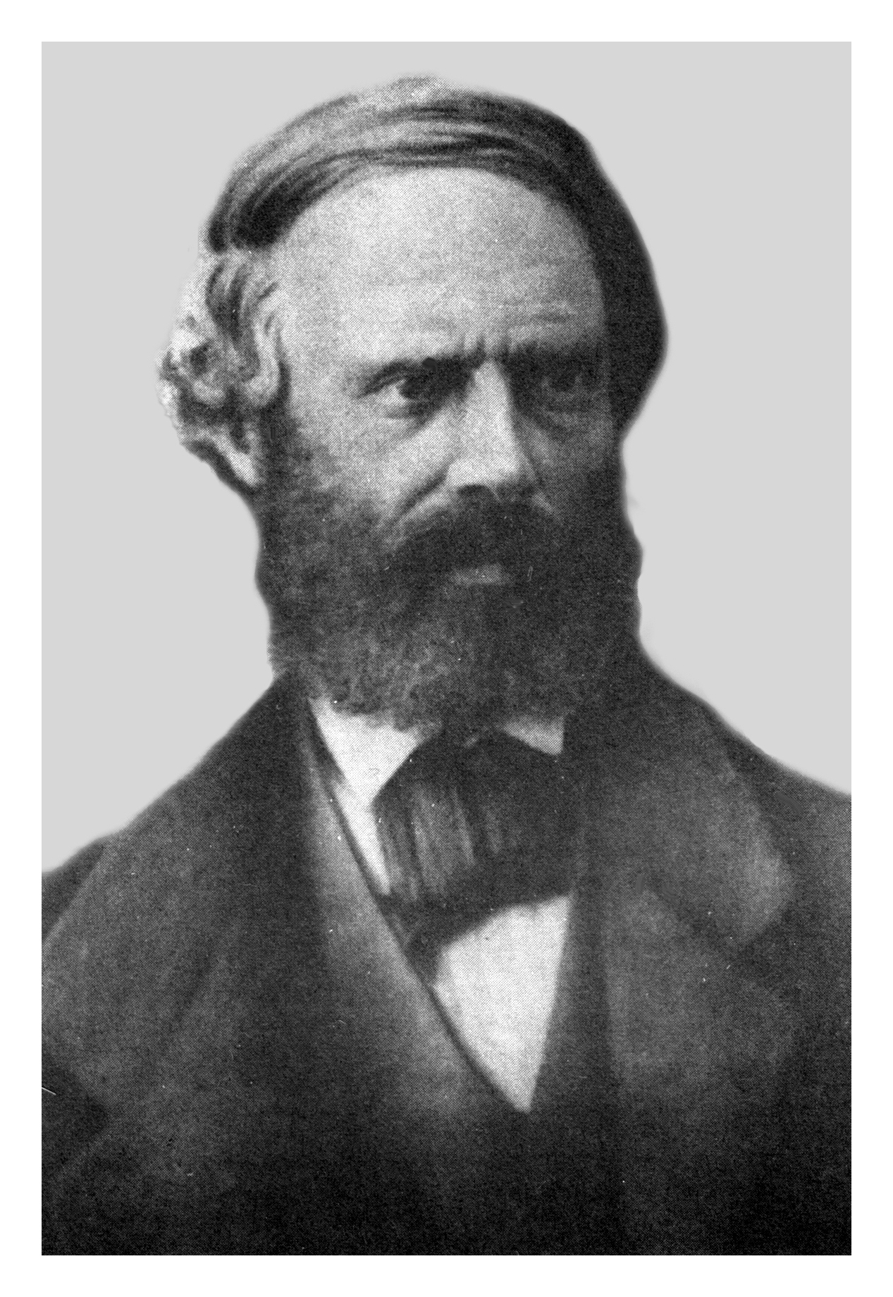 Portrait Georg Friedrich Walz